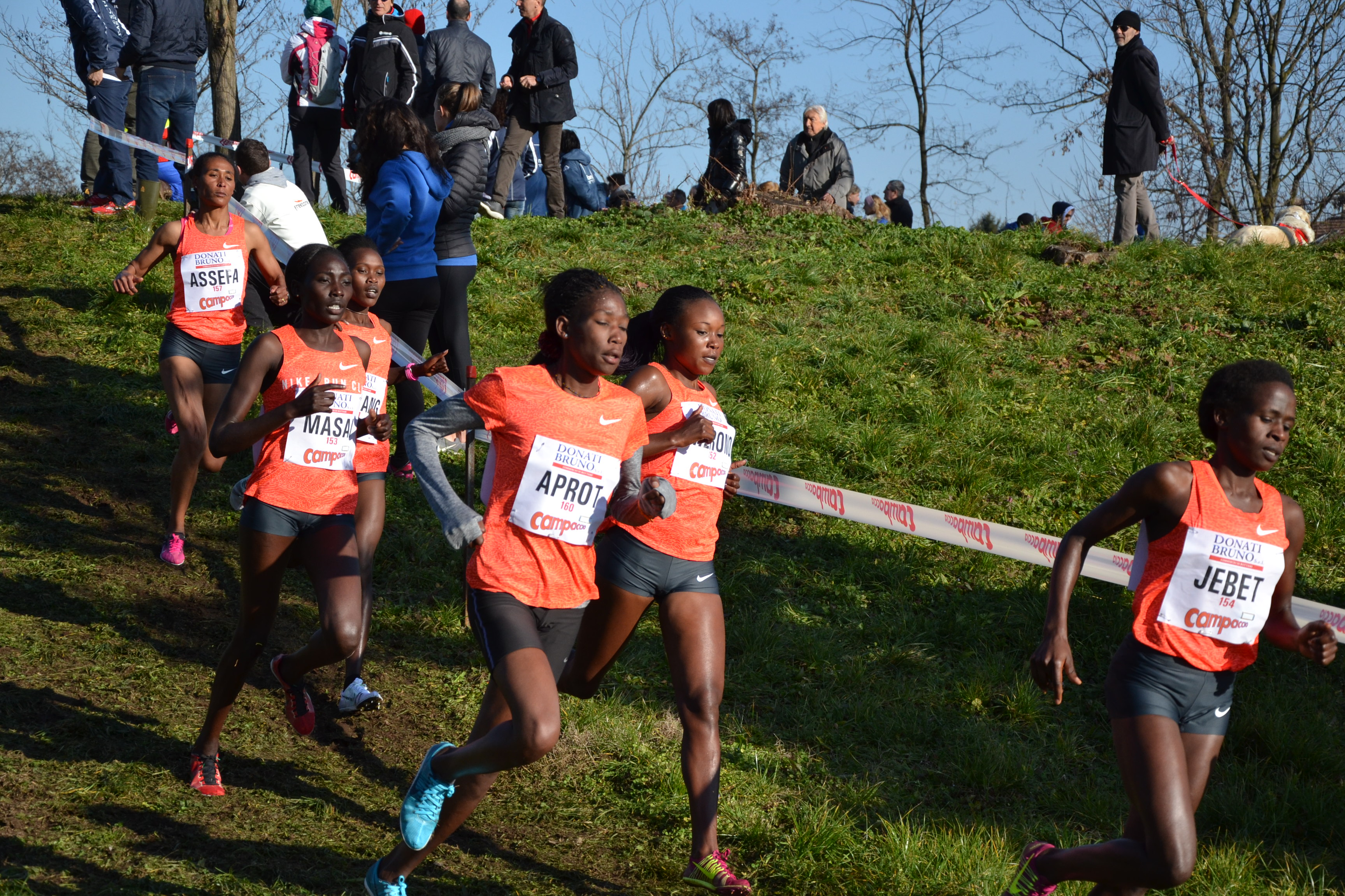 59º Cross del Campaccio. San Giorgio su Legnano, 6 gennaio 2016 Attribuzione: Lucia Moretti / A.S.D. Polisportiva Olonia / CC-BY-SA